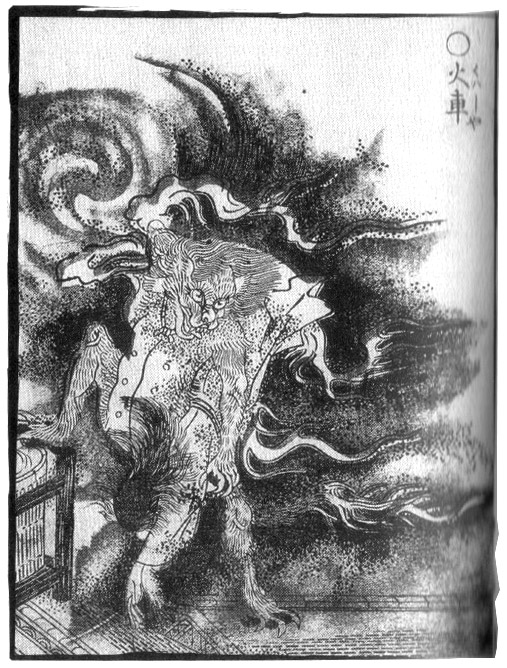 Kasha (火車) from the Gazu Hyakki Yakō